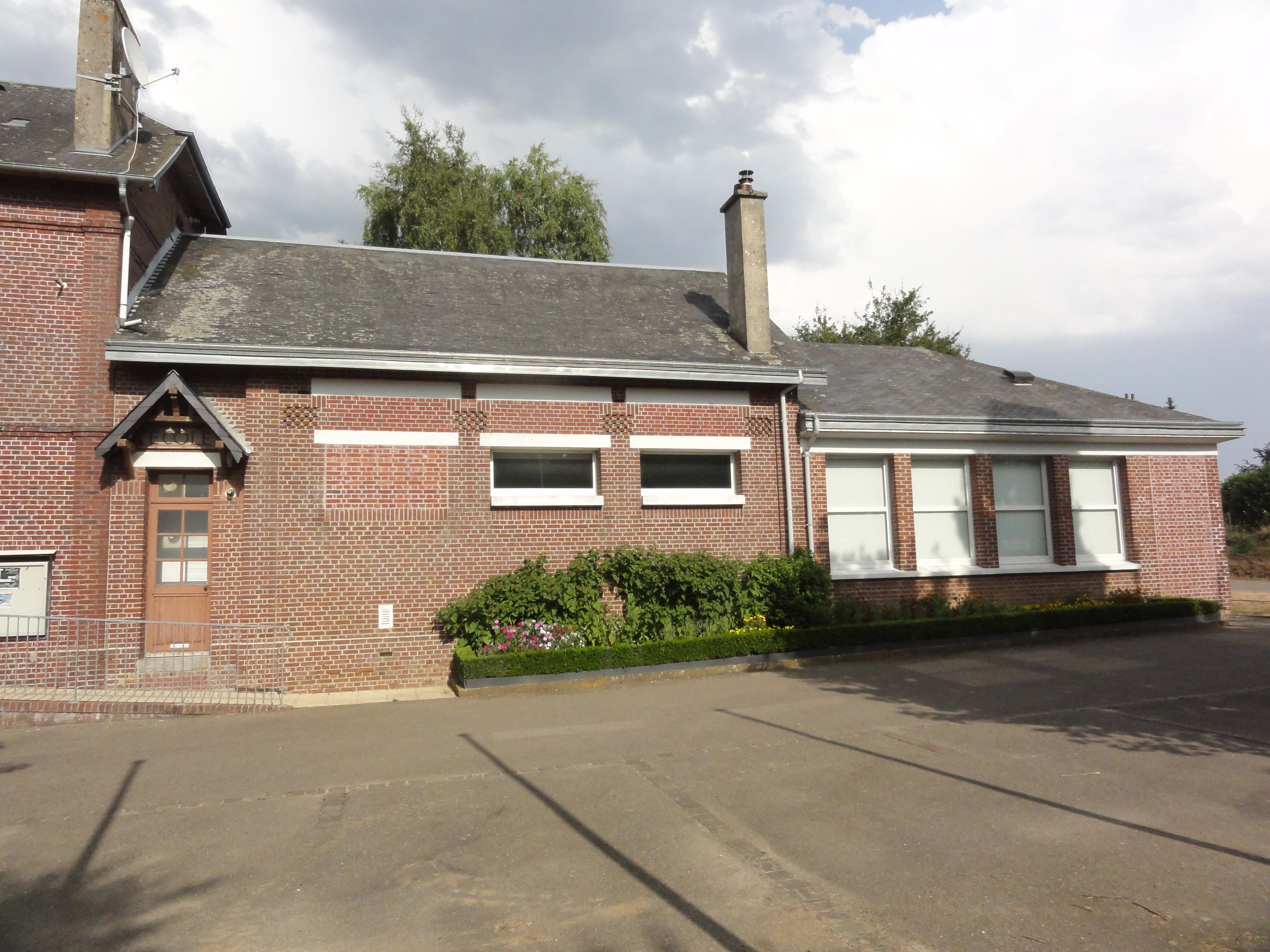 Foucart (Seine-Maritime) école